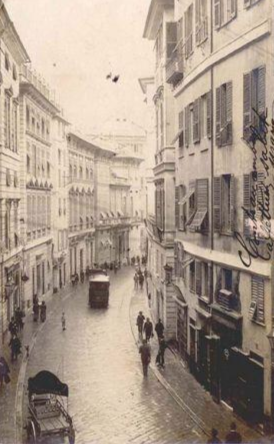 Via Cairoli o Strada Nuovissima Genoa